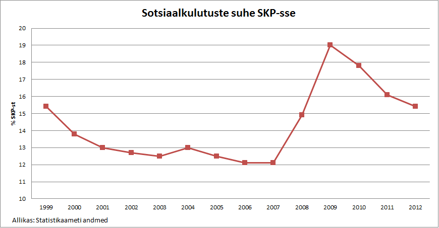 Eesti sotsiaalkulutused 1999-2012, % SKP-st